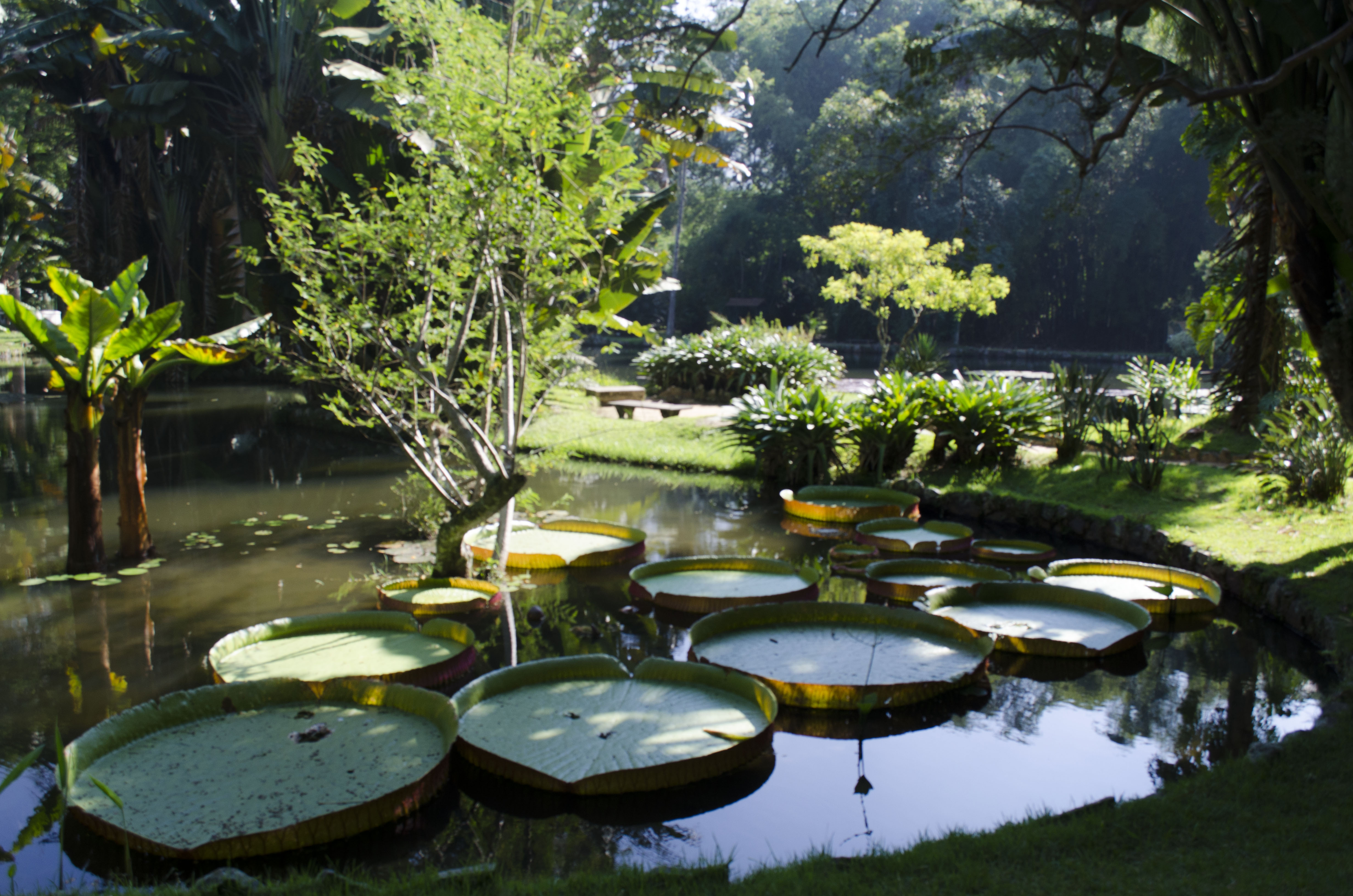 Linda flora encontrada no Jardim Botânico do Rio de Janeiro.